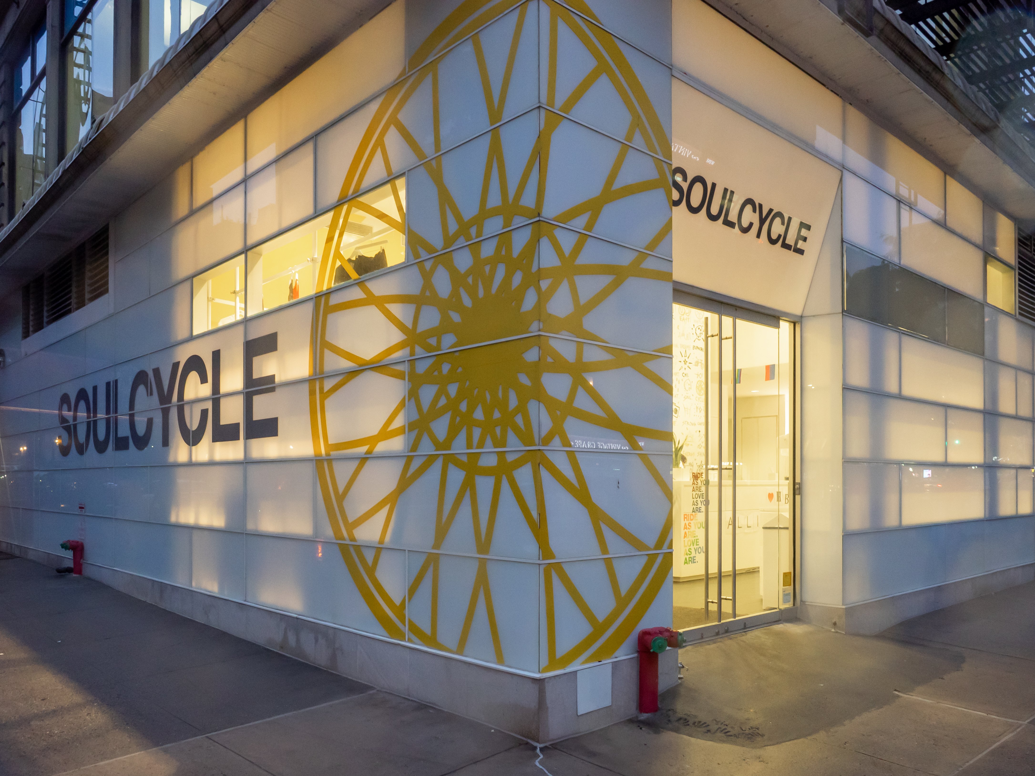 Upper East Side, NYC